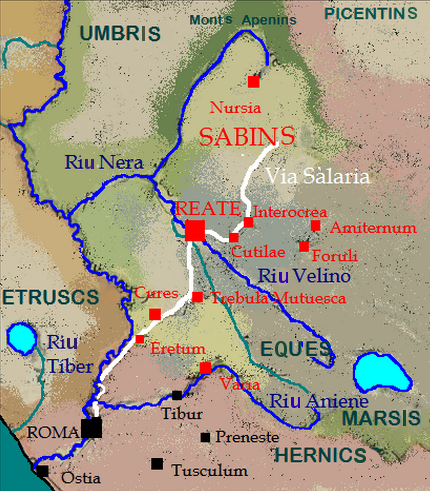 Pobles itàlics a l'antiguitat propers a Roma.